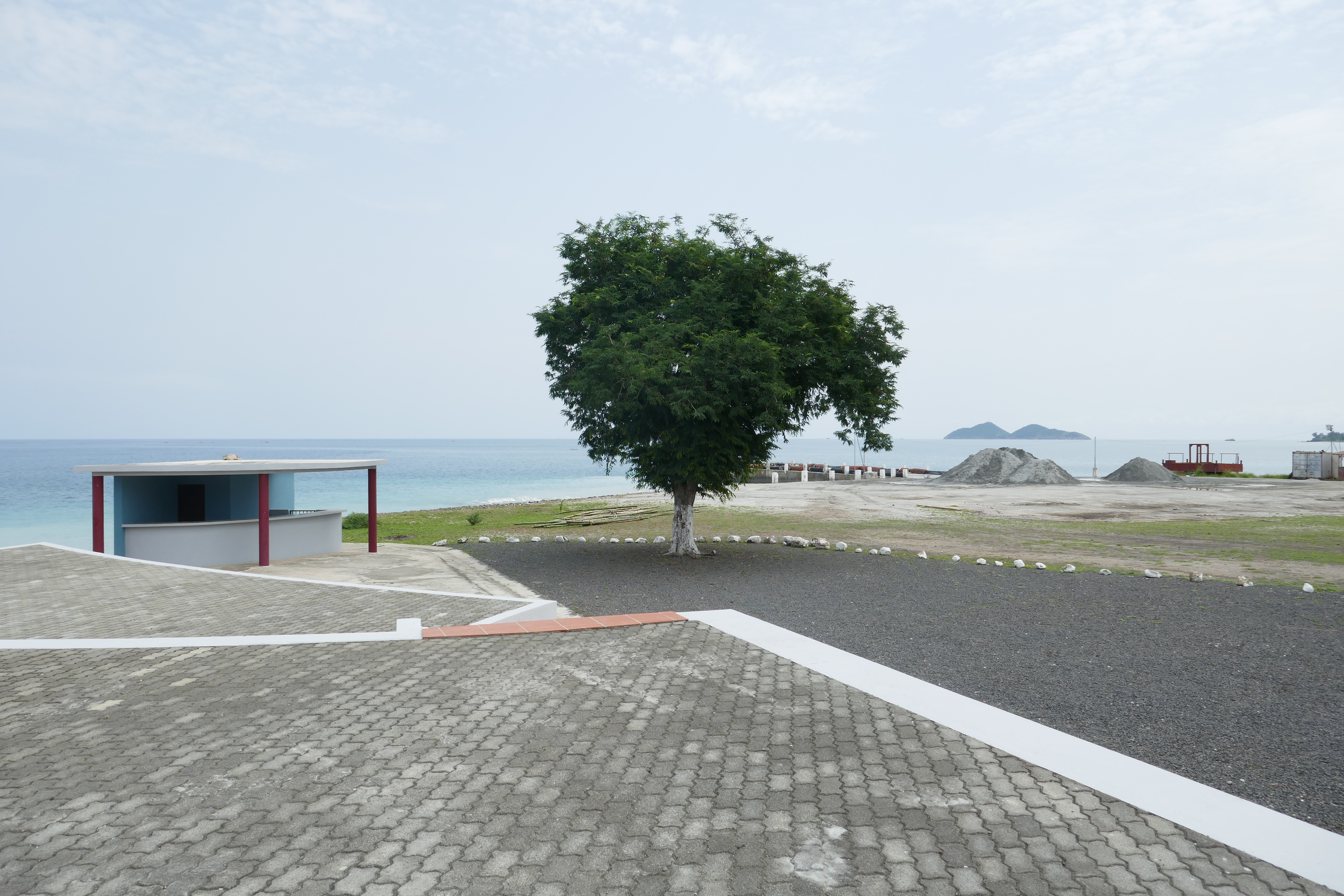 Monument à la mémoire des martyrs du 3 février 1953, érigé en 2015 sur la plage de Fernão Dias, au nord de l'île de São Tomé.